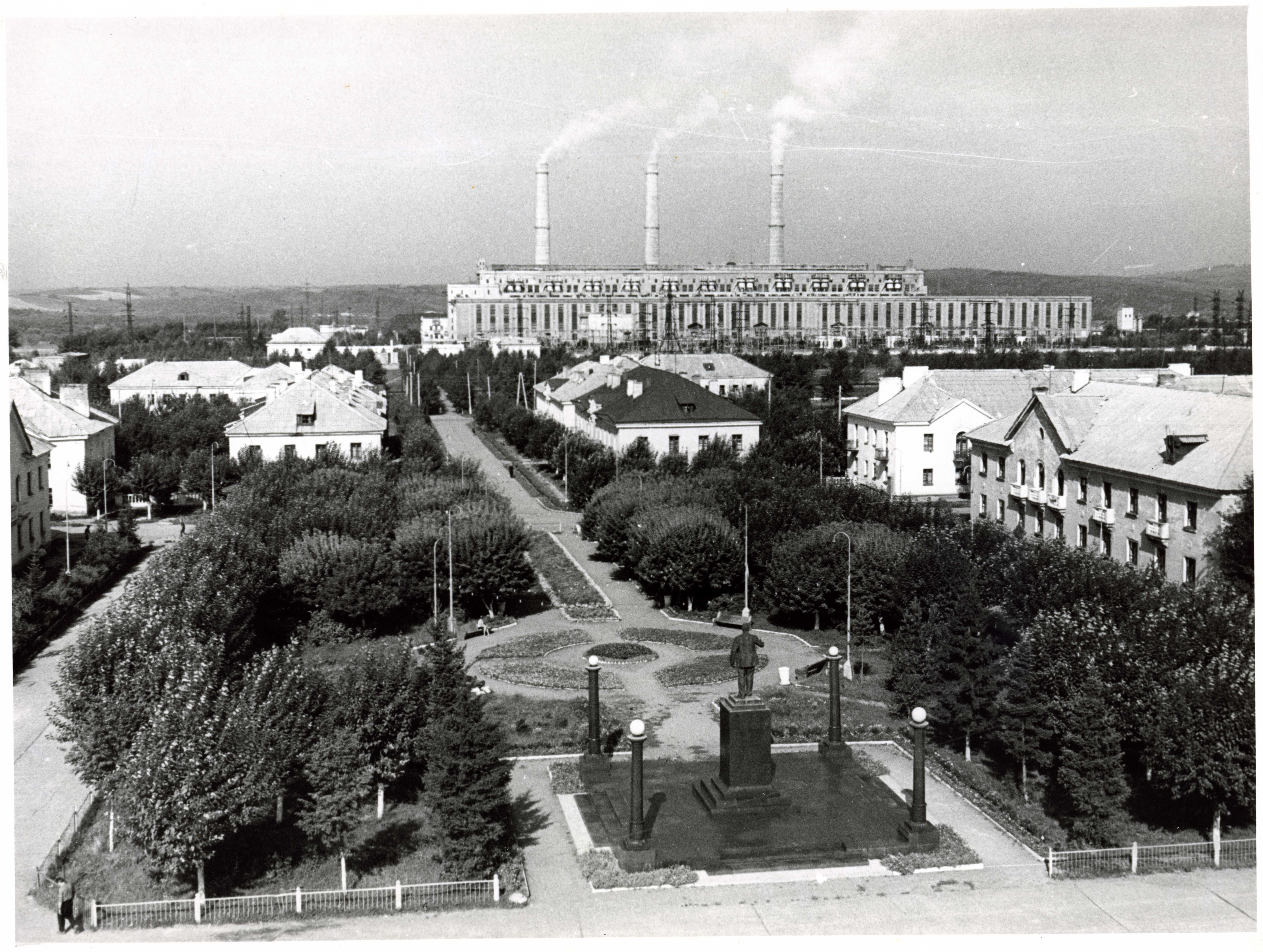 Город Калтан, центральная часть. Середина 1960-х годов. На заднем плане Южно-Кузбасская ГРЭС